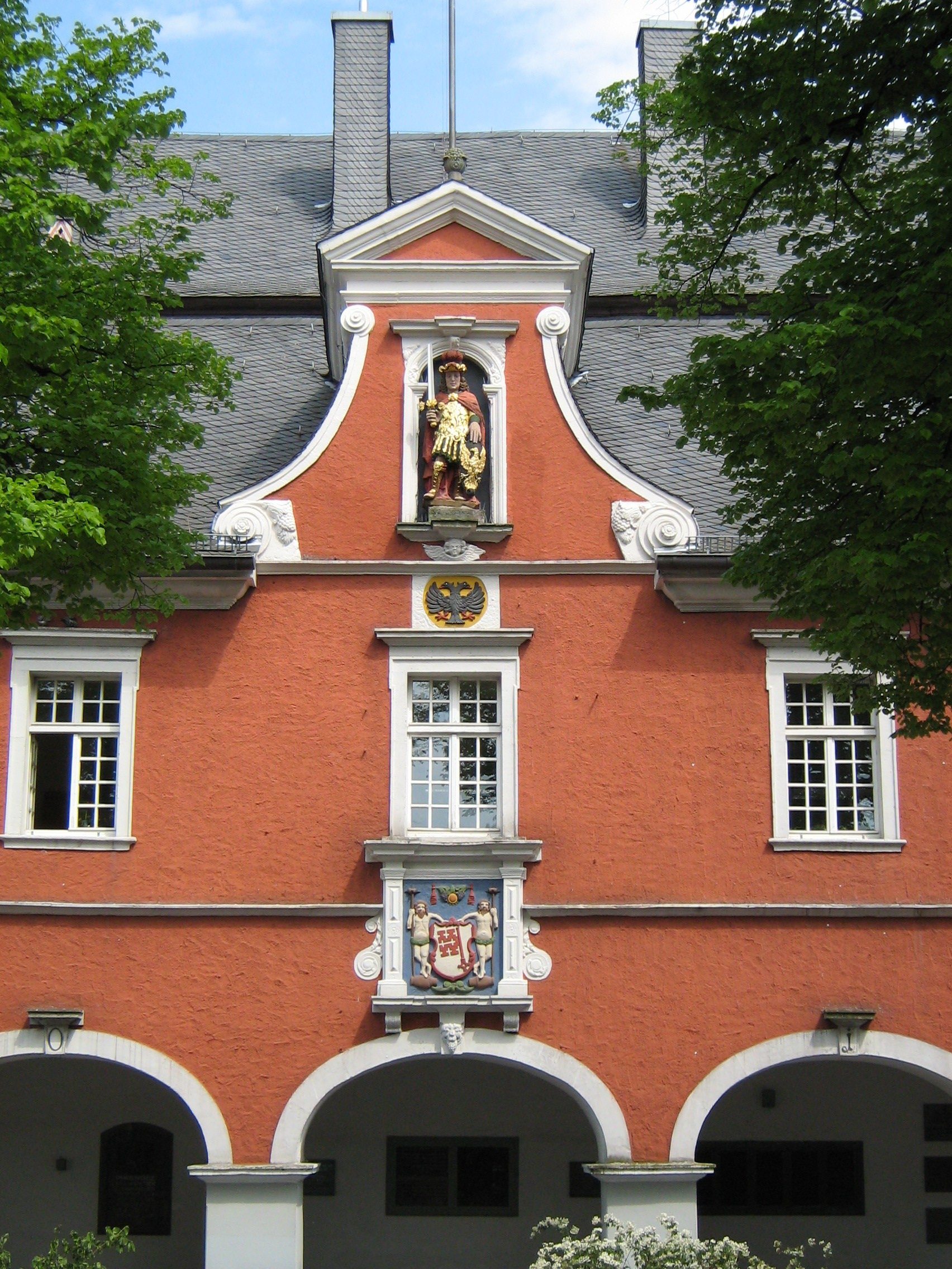 Mittelteil der barocken Rathausfront in Soest